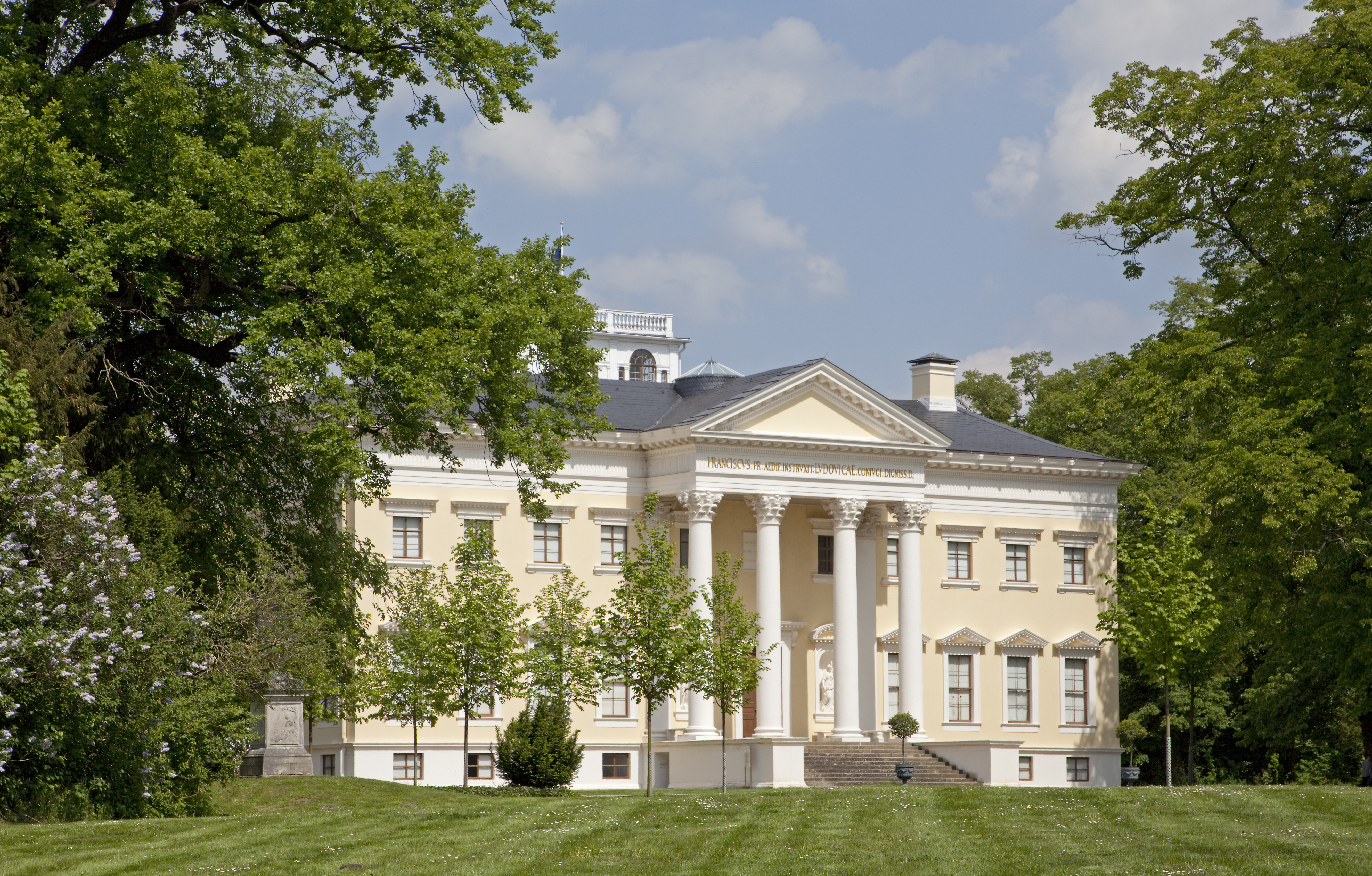 Das Wörlitzer Schloss